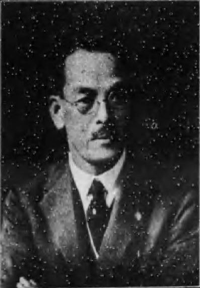 関根達発、1923年の写真